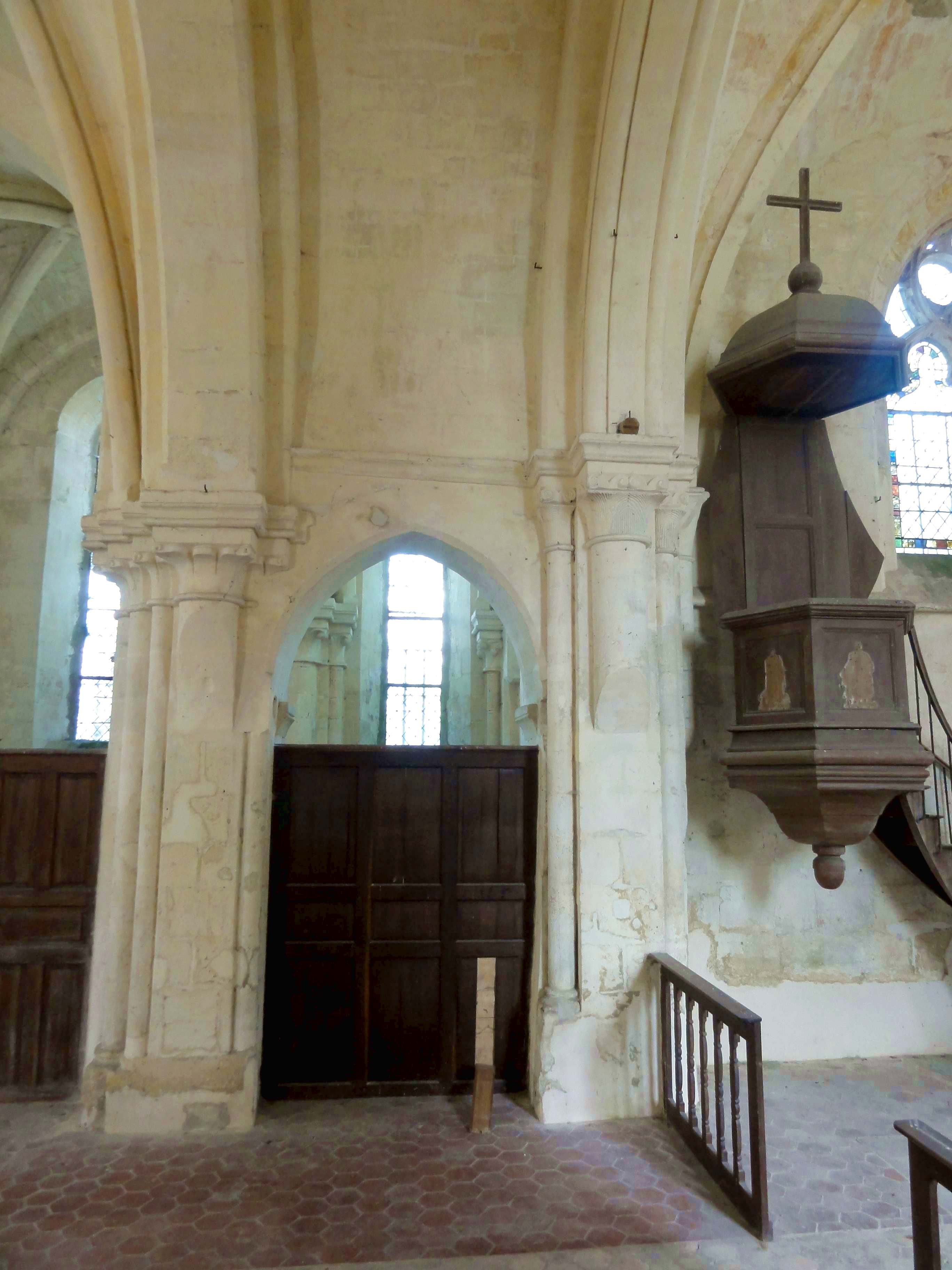 Intérieur de l'église - voir titre.